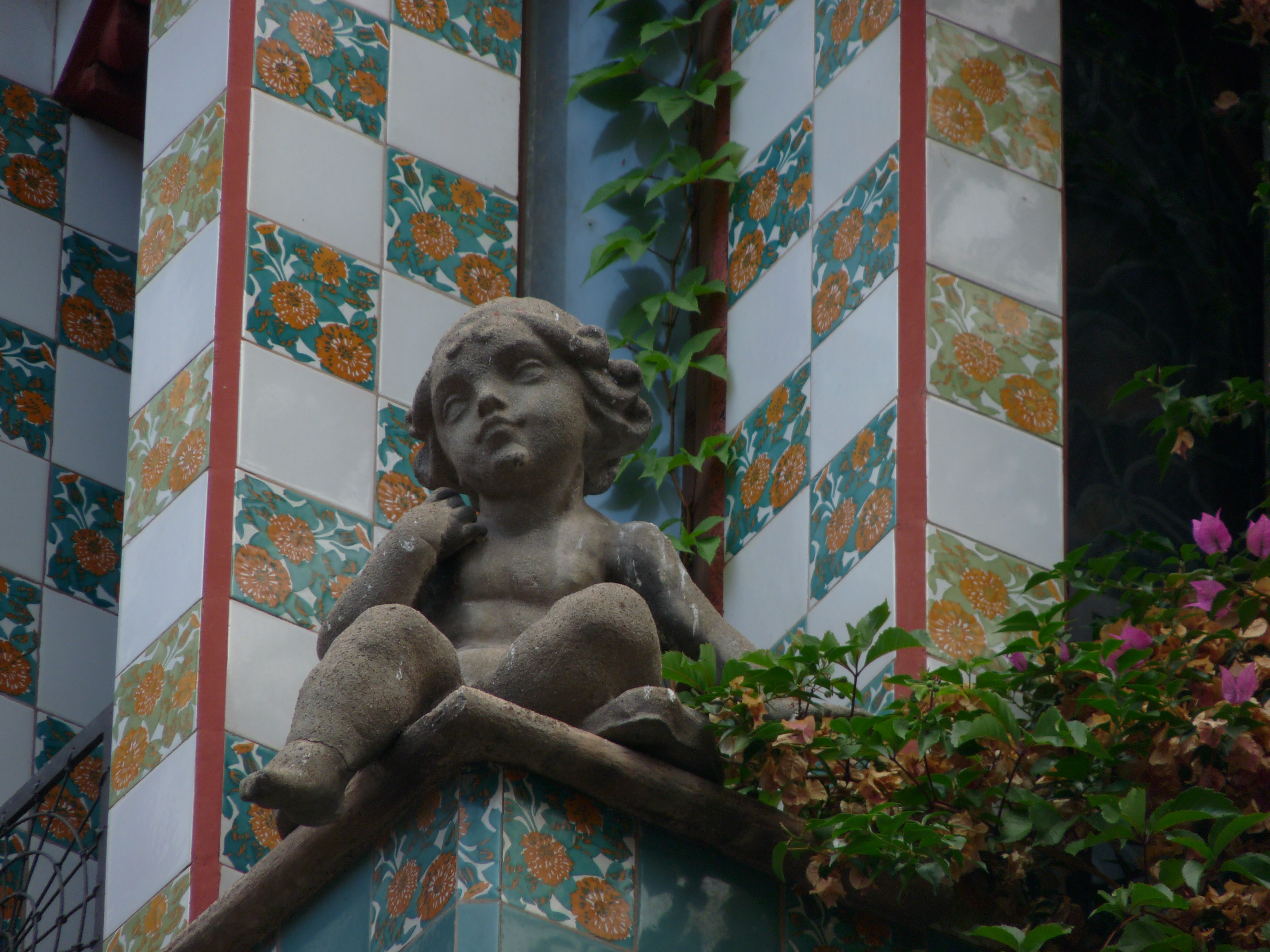 Casa Vicens (Barcelona)